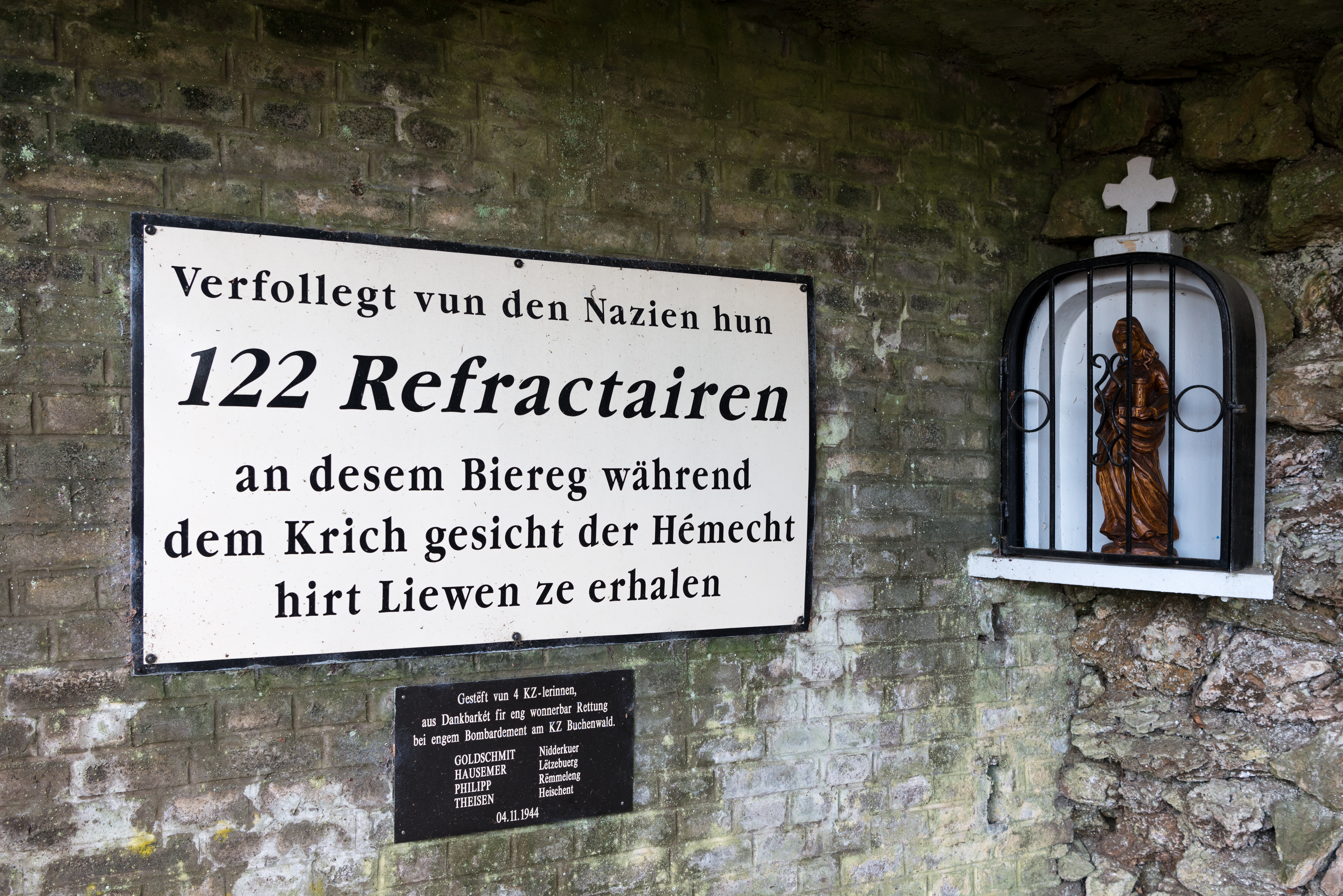 D'«Monument Honsbësch», hanner dem Monument aux Morts an der Avenue de la Liberté zu Nidderkuer.Hei gëtt un 122 Refractairen erënnert déi am Bunker Hondsbësch passéiert sinn. Honsbësch oder Hondsbësch? Heiriwwer schéngt Onkloerheet ze herrschen. Op de Websäite fënnt ee béid, oft déi zwéin um nämlechte Site. Um Kadaster gëtt de Bësch ënner Honsbësch gefouert.